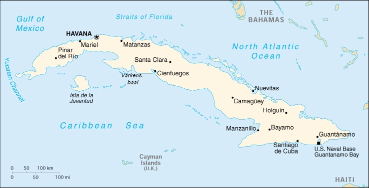 Kaart van CIA World Fact Book, met daarin locatie Varkensbaai aangegeven (eigen aanpassing)